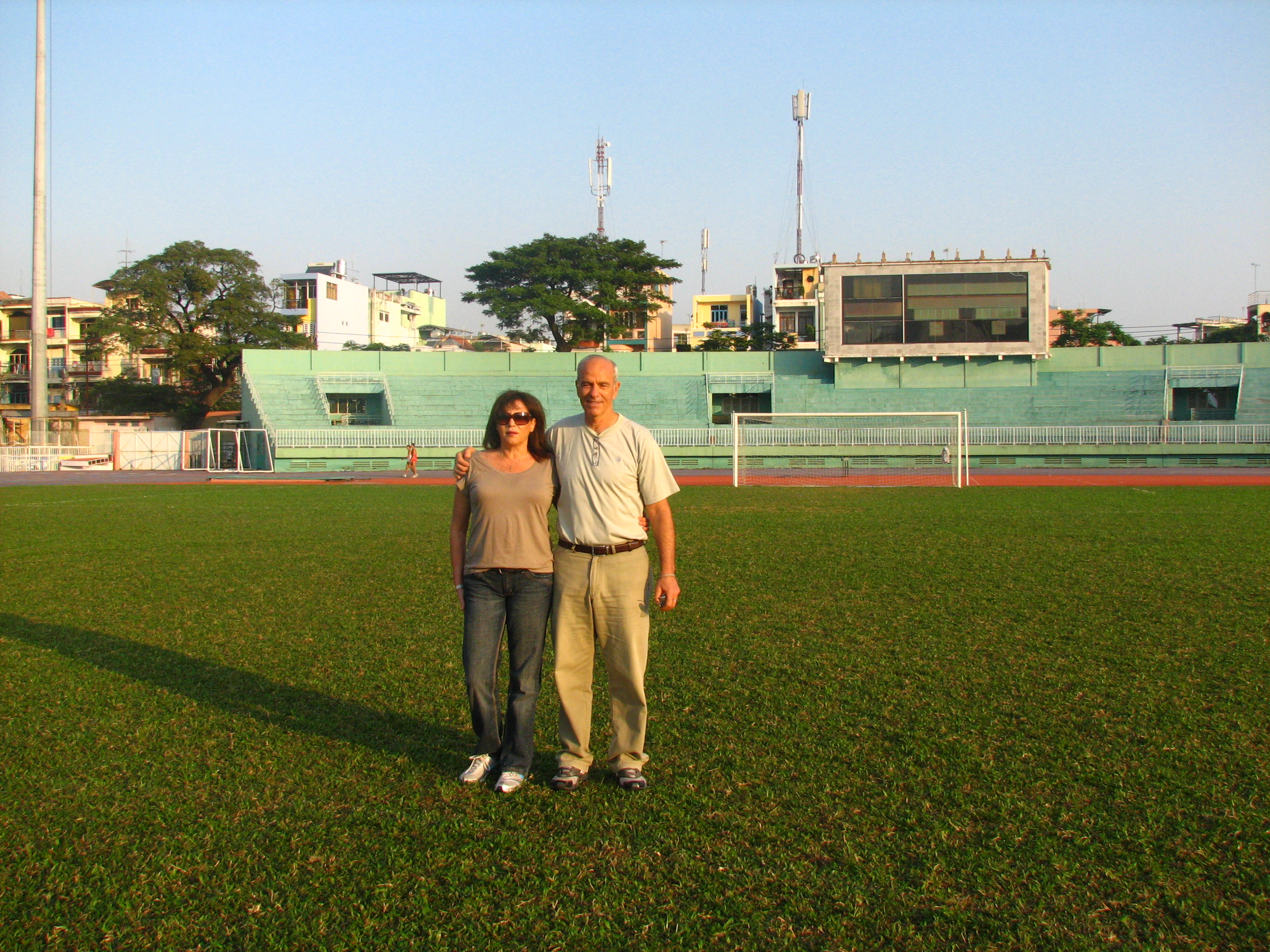 יצחק ויסוקר ואשתו חנה בעת ביקור בויטנאם בינואר 2009. התמונה צולמה במגרש הכדורגל בו שיחק בשנת 1963